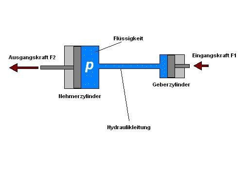 Geberzylinder